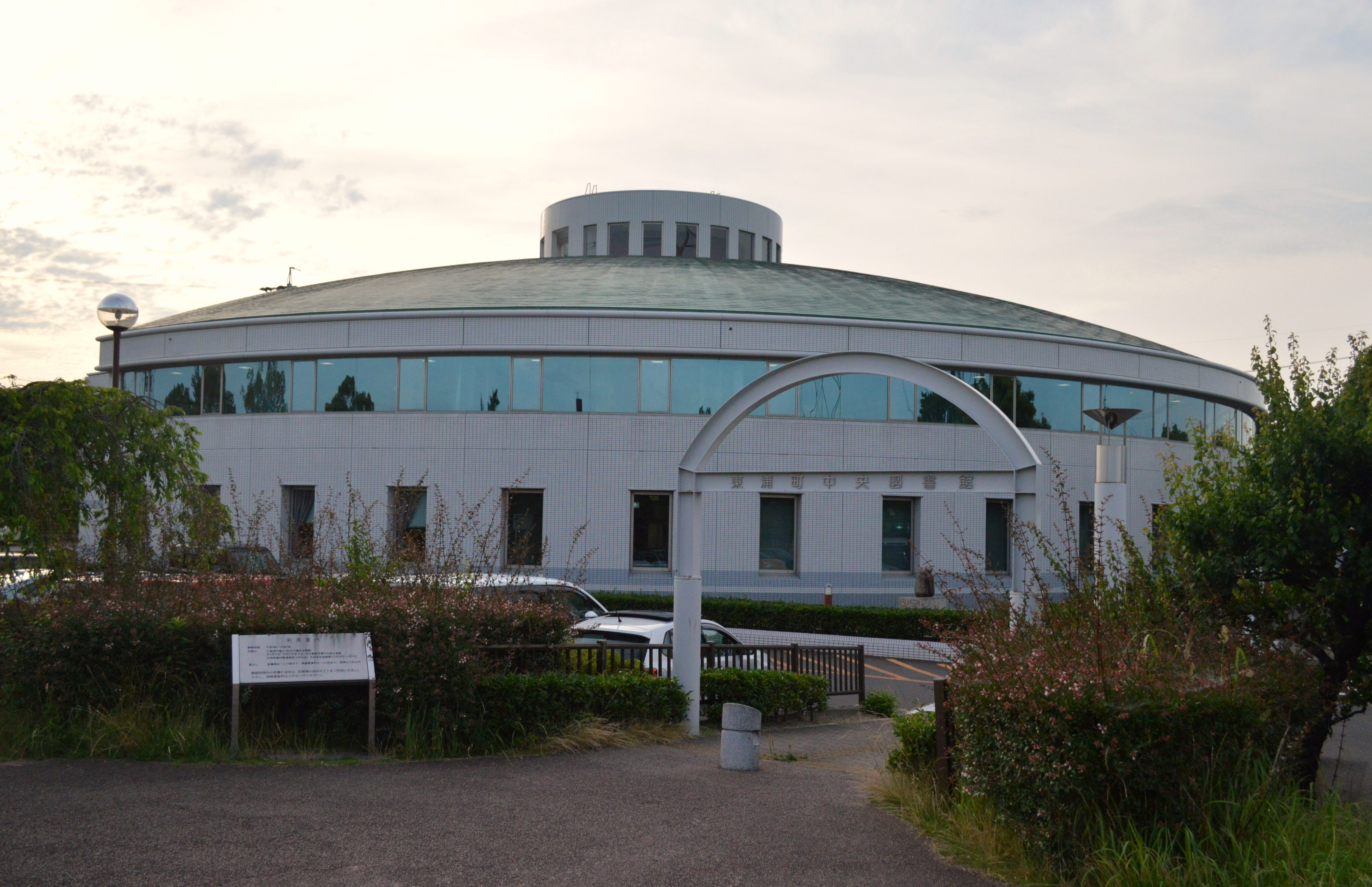 東浦町中央図書館